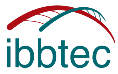 Logotipo del Instituto de Biomedicina y Biotecnología de Cantabria